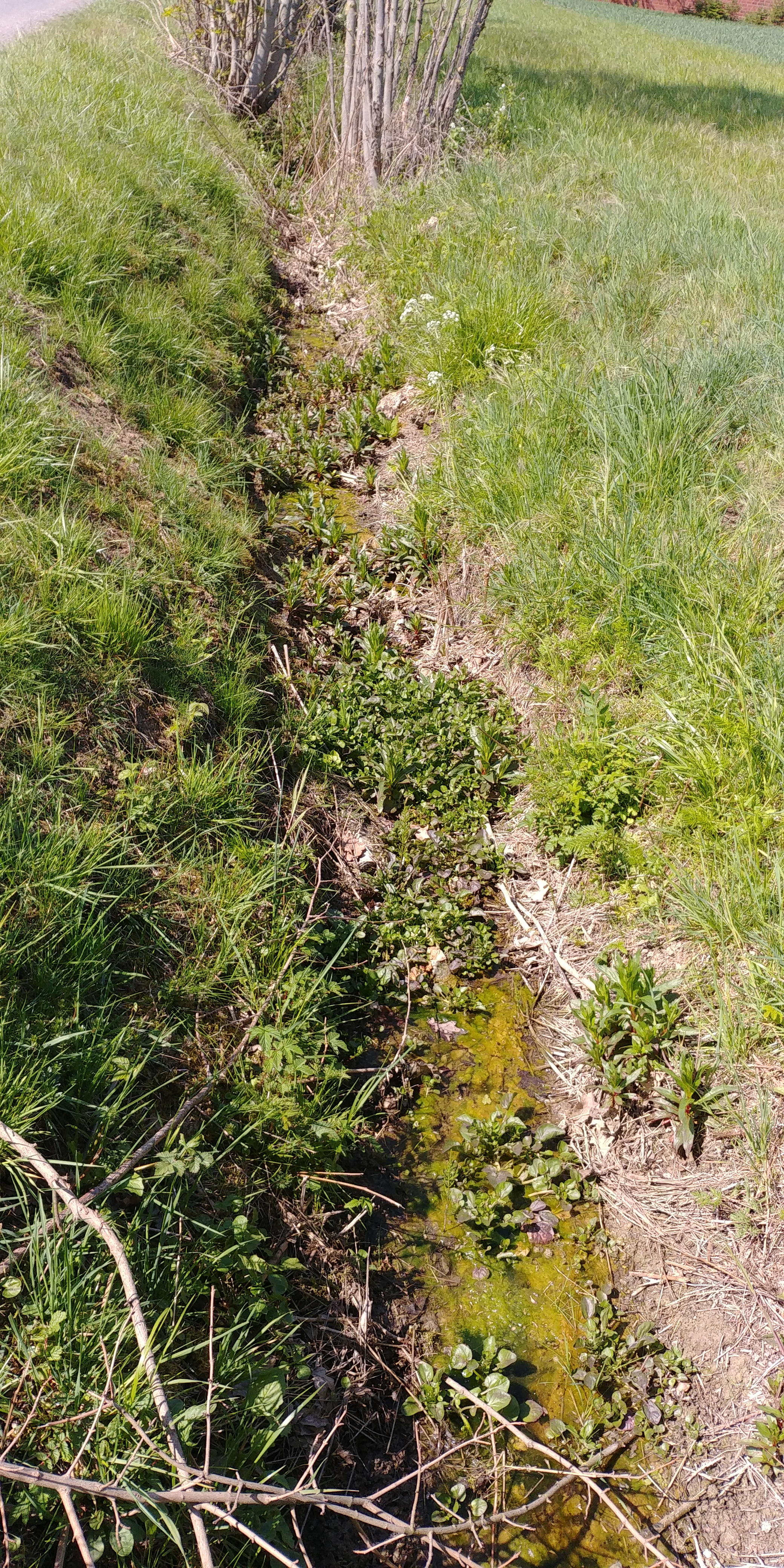 Flusslauf der Angel 100 Meter von der Quelle. Die Angel sieht hier eher nach einem Straßengraben aus.